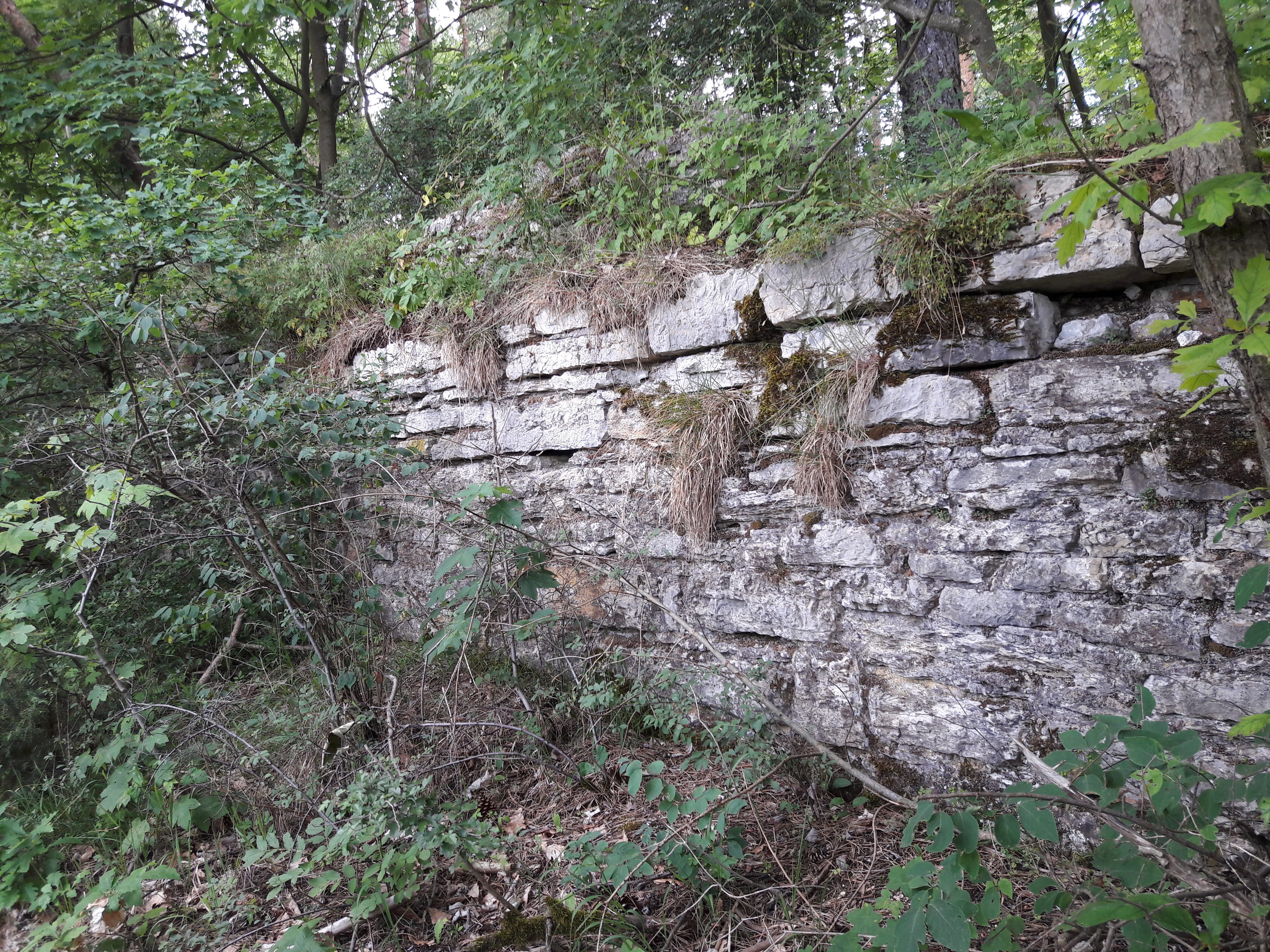 Mauerreste der Reinsburg bei Plaue, Thüringen